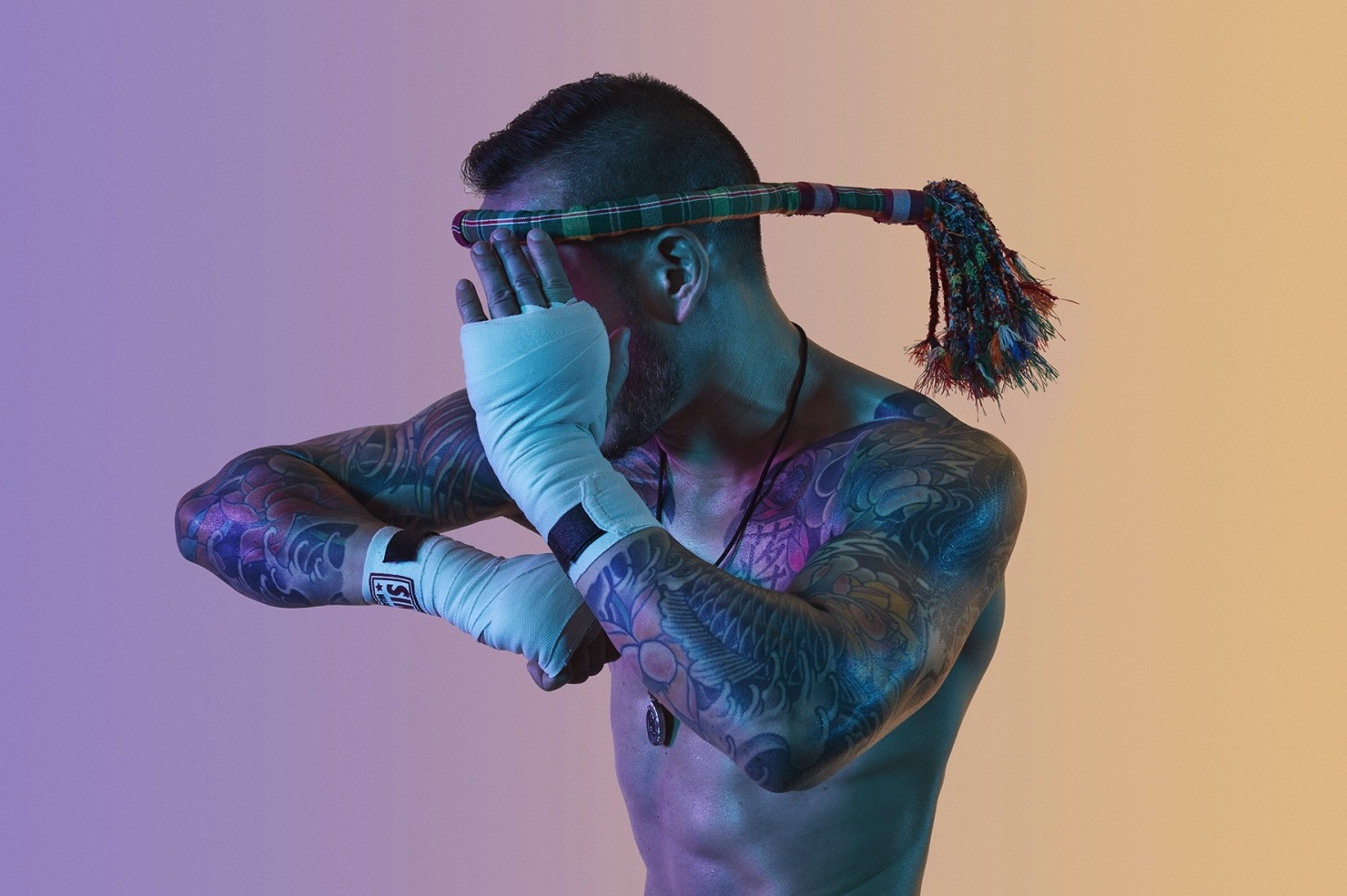 ThaÏ Boxing